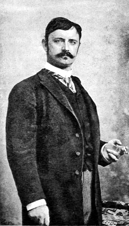 Bethlen András (1847–1898) politikus, miniszter portréja. Ellinger Ede fényképfelvétele